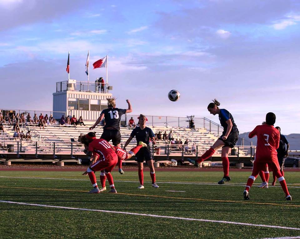 The United States Armed Forces Delegation hosts the 11th Conseil International du Sport Militaire (CISM) World Military Women's Football (Soccer) Championship Fort Bliss, Texas, June 22 through July 5, 2018. This event will feature teams from